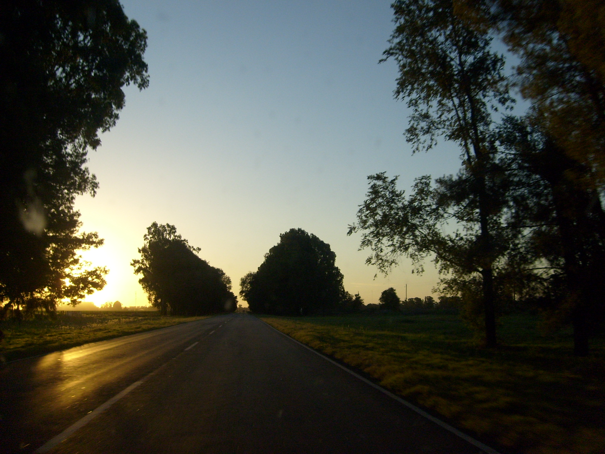 Imagen de la ruta nacional 5 al límite entre la provincia de la Pampa y Buenos Aires, a pocos kilómetros de la localidad de Catriló.